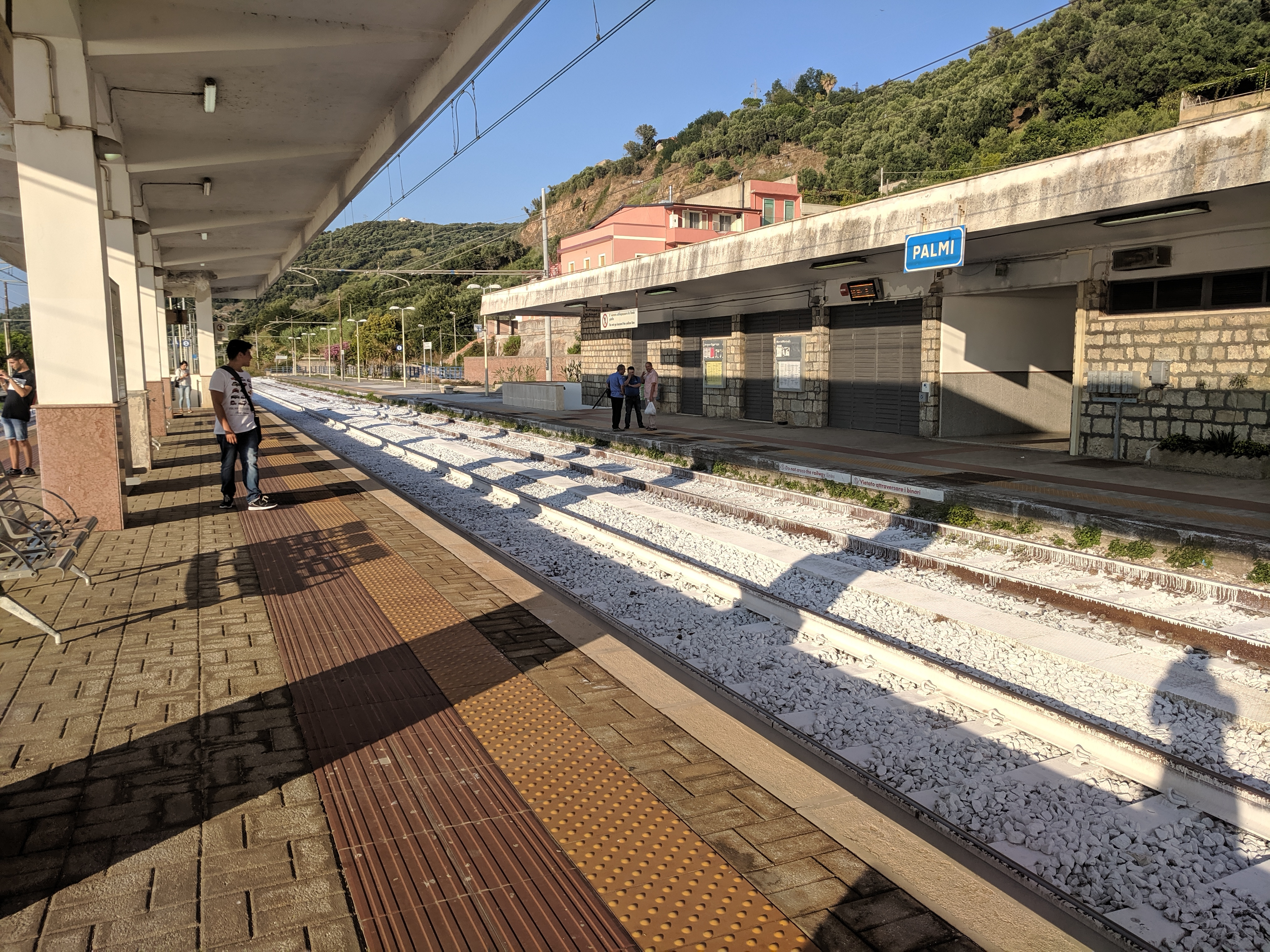 Vista binari 1 e 2 della stazione di Palmi